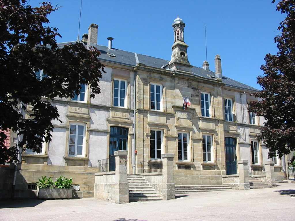 Longchamp Mairie-école (1874) Commune du canton d'Épinal-Est (Vosges) Photo personnelle du 10 juillet 2006. Copyright © Christian Amet